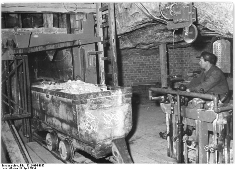 Unterbreizbach, Zeche "Marx-Engels", Bergarbeiter, Lore Zentralbild Wlocka TBD Re-Wi. 8.4.1954 Sieger im Wettbewerb der Kaliwerke. Untertage erreichten die Kumpels des volkseigenen Kaliwerkes "Marx-Engels", Unterbreizbach, im Monat der höchsten Produktion am 4.3.1954 ihre bisher höchste Förderleistung mit 120% seit Bestehen des Werkes. Am 19.3.1954 meldeten die Kumpels aus der Fabrik, daß sie ihren Plan in der Herstellung von sechziger Chlorkalium mit 140% erfüllt haben. Durch diese Leistungen konnte das Werk "Marx-Engels" als erstes Kaliwerk in unserer Republik die hundertprozentige Erfüllung des Quartalsolls am 25.3.1954 melden. Bis Ende des Quartals steigerten die Kumpels ihre Produktion auf 108,7%, damit wurden sie Sieger im Wettbewerb der Kalischächte. UBz: Im gleichen Tempo wie die Loren bei dem Schrapper gefüllt werden, müssen sie von dem Anschläger Rudolf Panzner in den Förderschacht gestoßen werden. Durch seine verantwortungsvolle Arbeit wird ein Wagenstau verhindert.